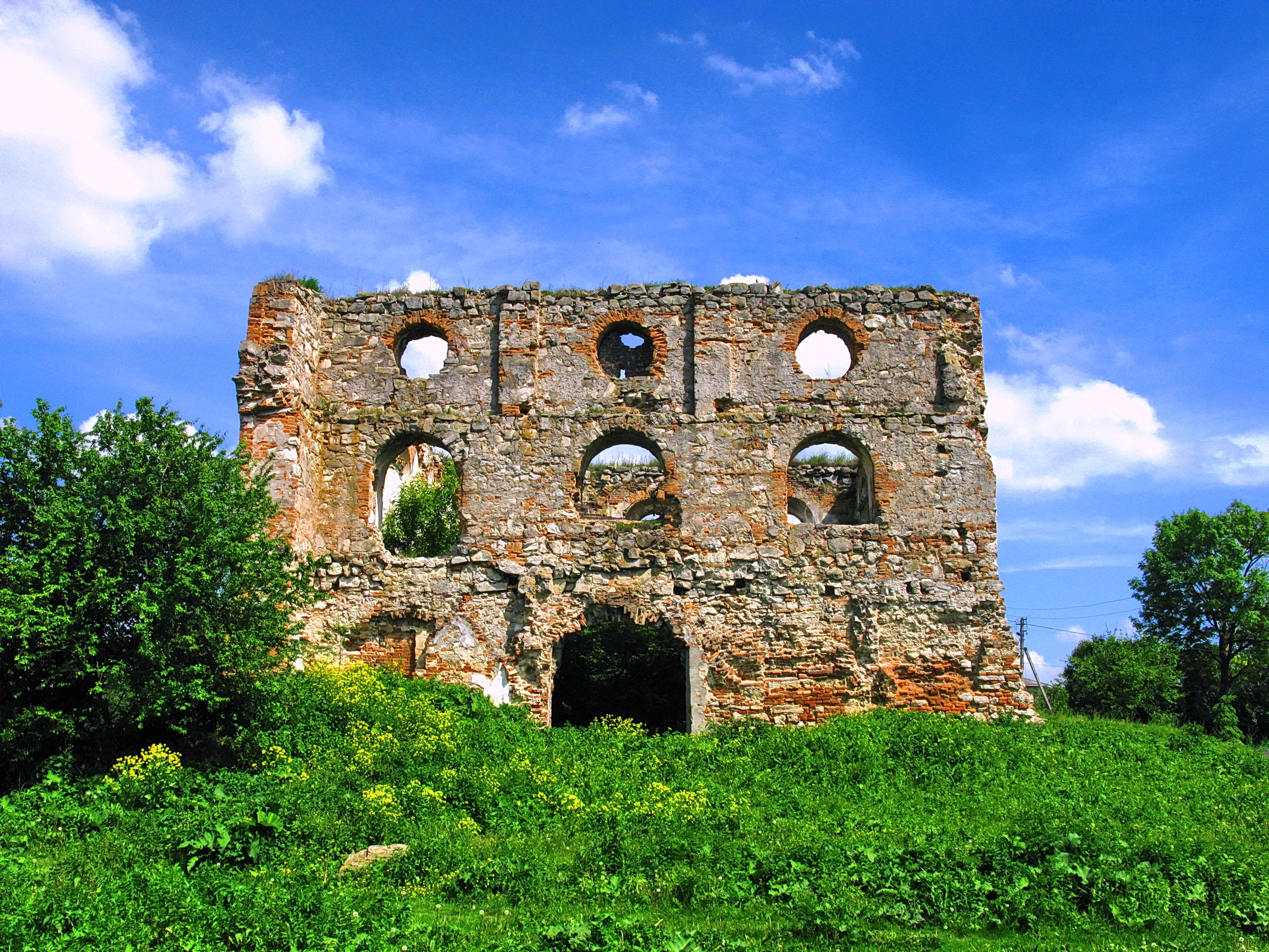 Синагога(мур.), Гримайлів